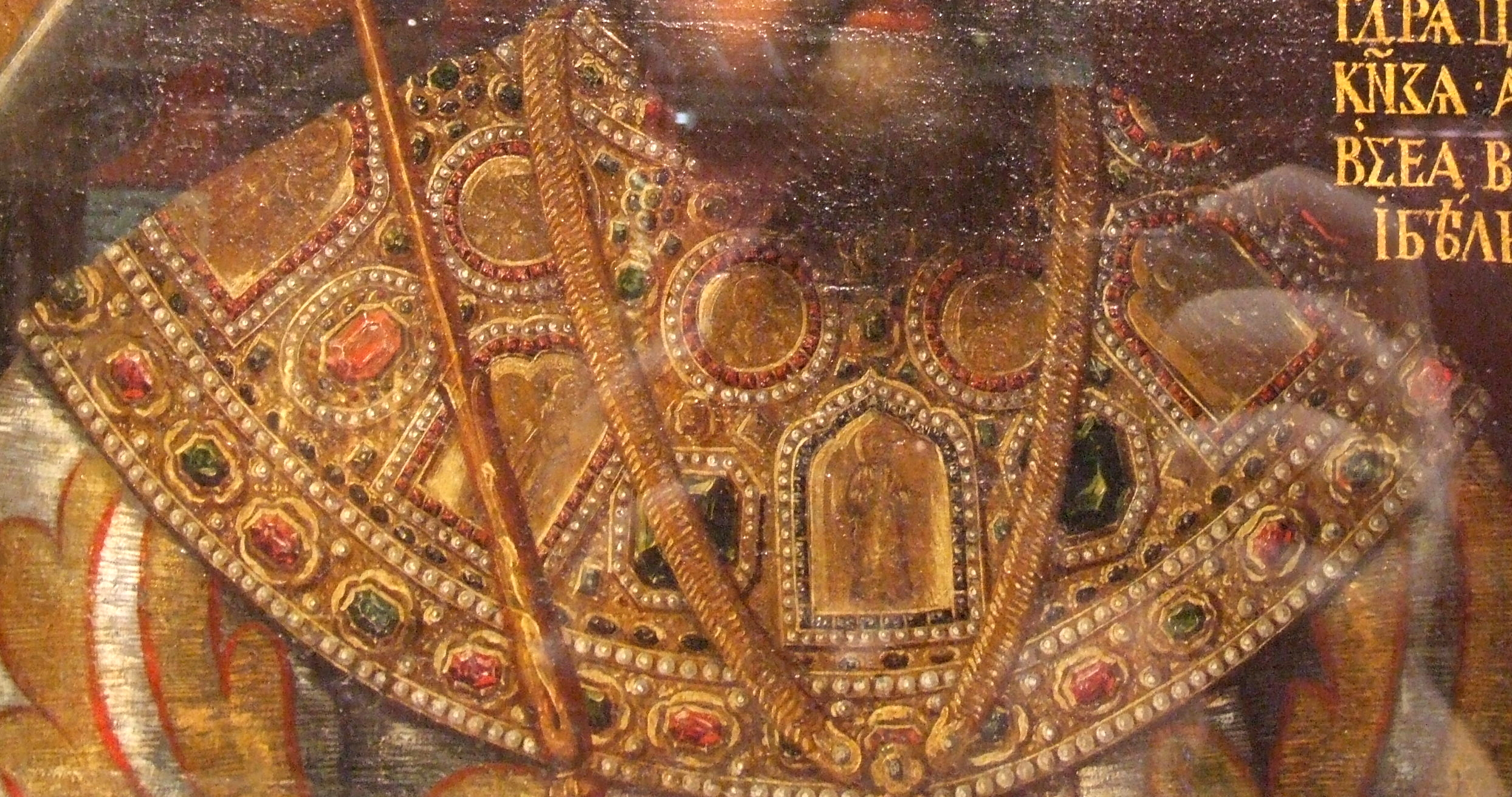 Неизвестный русский художник второй половины 17 века. Школа Оружейной палаты. Портрет царя Алексея Михайловича. Конец 1670 - начало 1680 годов Поступил в 1924 году из ГТГ До 1917 года находился в собрании князя Б.А. Куракина в имении Куракино Орловской губернии ГИМ инв. 55384 ИI-3462